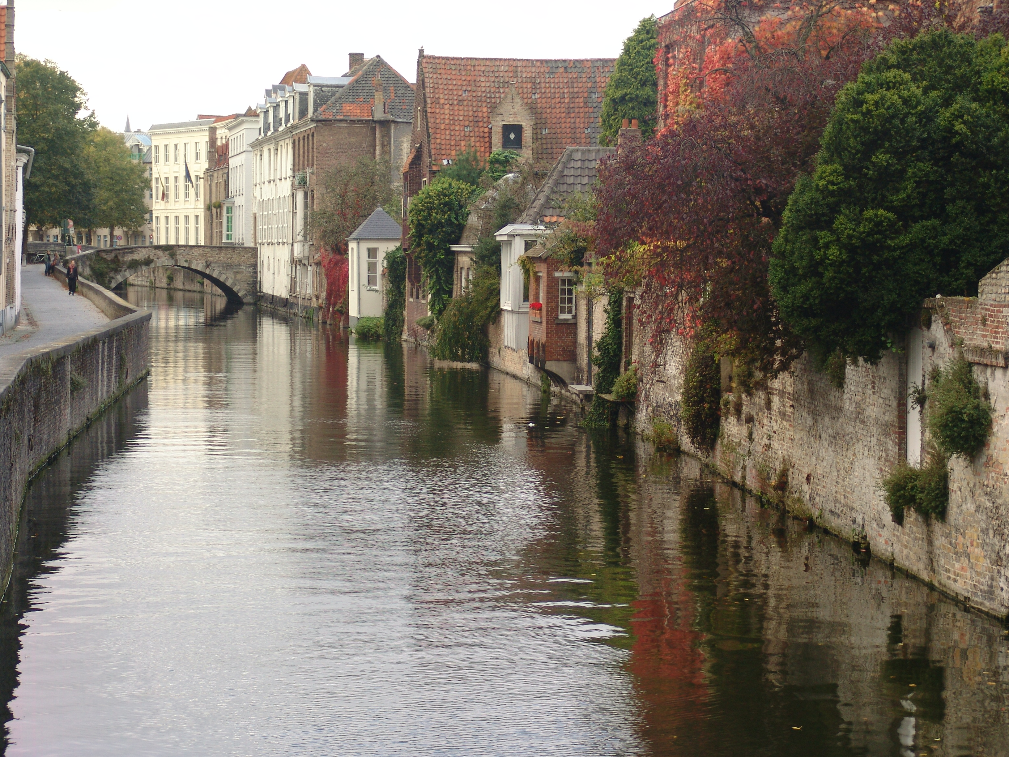 Gouden Handrei à Bruges